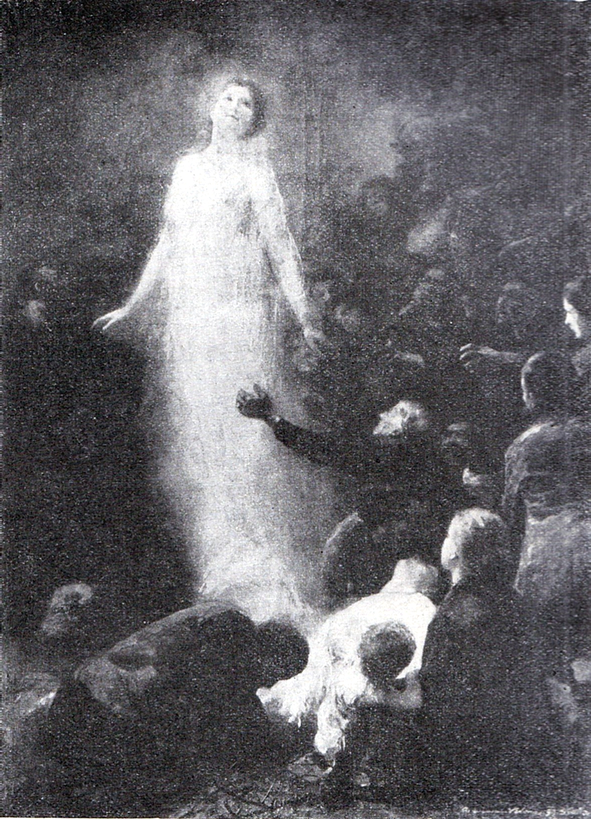 Speranta